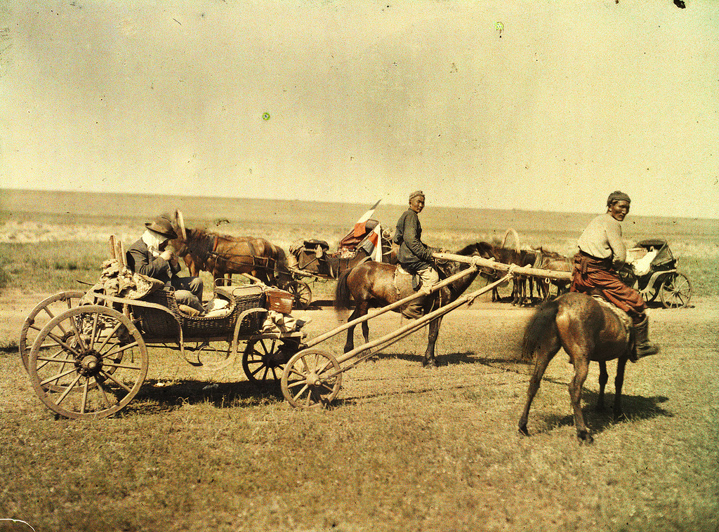 1913年，斯蒂芬·帕塞（本系列照片的拍摄者）的四轮马车在恰克图（Kykhta）和库伦（Khuree）两地之间行驶。图中可见俄罗斯国旗和法国国旗。